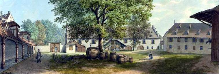 Das alte Zeughaus von Basel stand in der Nähe des heutigen Petersplatzes. Ein Weißabgleich wurde durchgeführt, diese Version wirkt deutlich heller und farbenkräftiger als das Original.